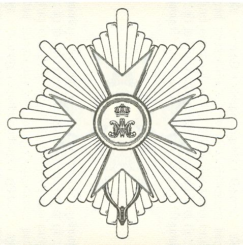 Ster van de Orde van het Gulden Spoor, Vaticaan